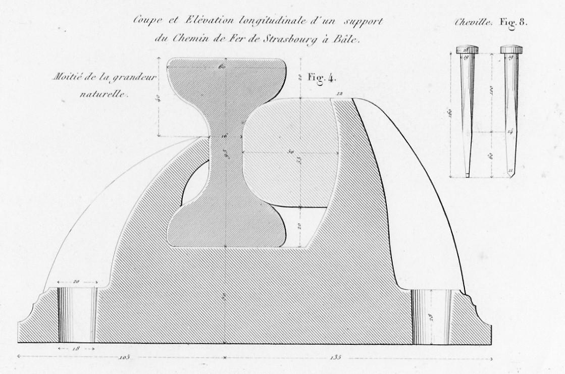 Chemin de fer de Strasbourg à Bâle - Coupe transversale de l'attache d'un rail dans son coussinet.